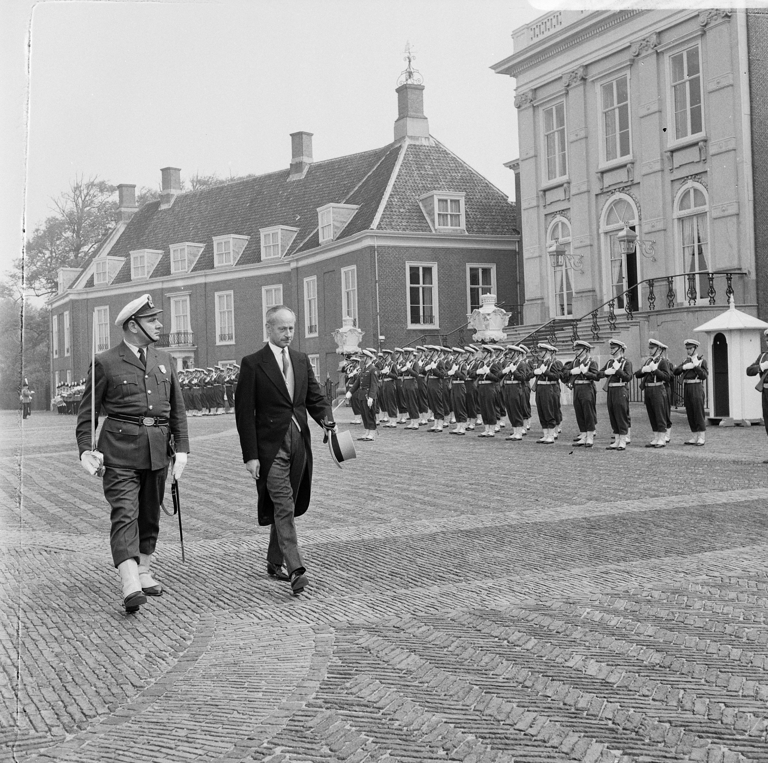 Collectie / Archief : Fotocollectie Anefo Reportage / Serie : Belgische ambassadeur Baron Van der Straeten Waillet neemt afscheid op Paleis Huis ten Bosch Beschrijving : Inspectie van de erewacht Datum : 11 september 1966 Locatie : Den Haag, Zuid-Holland Trefwoorden : ambassadeurs, erewachten, paleizen Instellingsnaam : Huis Ten Bosch Fotograaf : Voets, Jan / Anefo Auteursrechthebbende : Nationaal Archief Materiaalsoort : Negatief (zwart/wit) Nummer archiefinventaris : bekijk toegang 2.24.01.03 Bestanddeelnummer : 919-5519